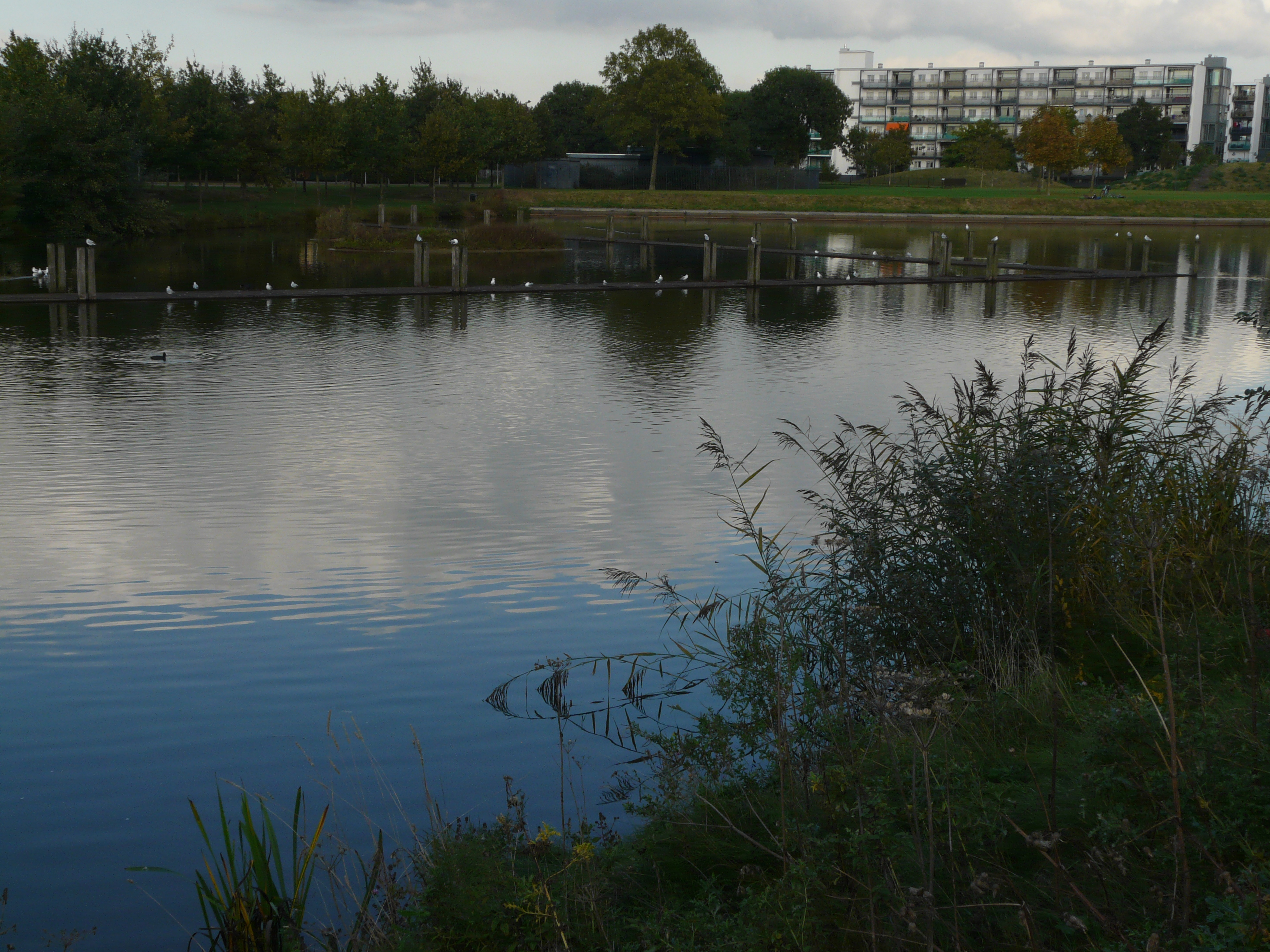 Zicht op een deel van park Westertuin gelegen in de wijk Westerpark in Breda